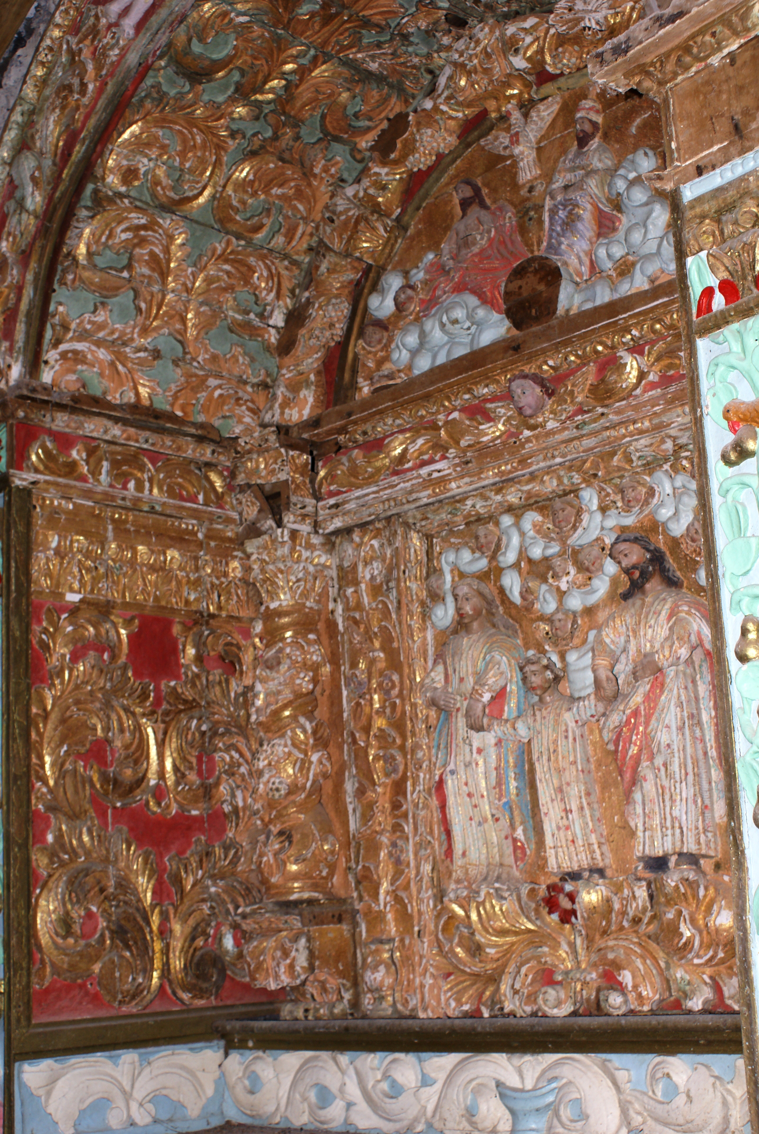 Ermida de Jesus, Maria, José da Urzelina, retábulo, Urzelina, Velas, ilha de São Jorge, Açores